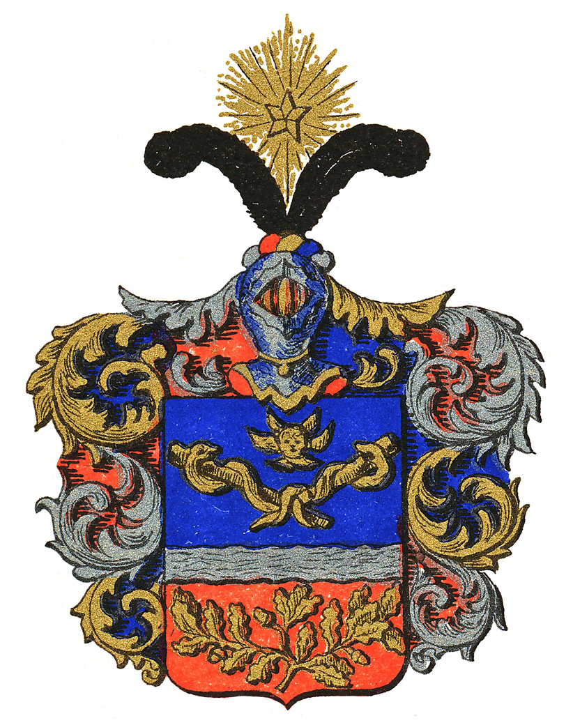 Ekströmer vapensköld enligt riddarhuset 2016